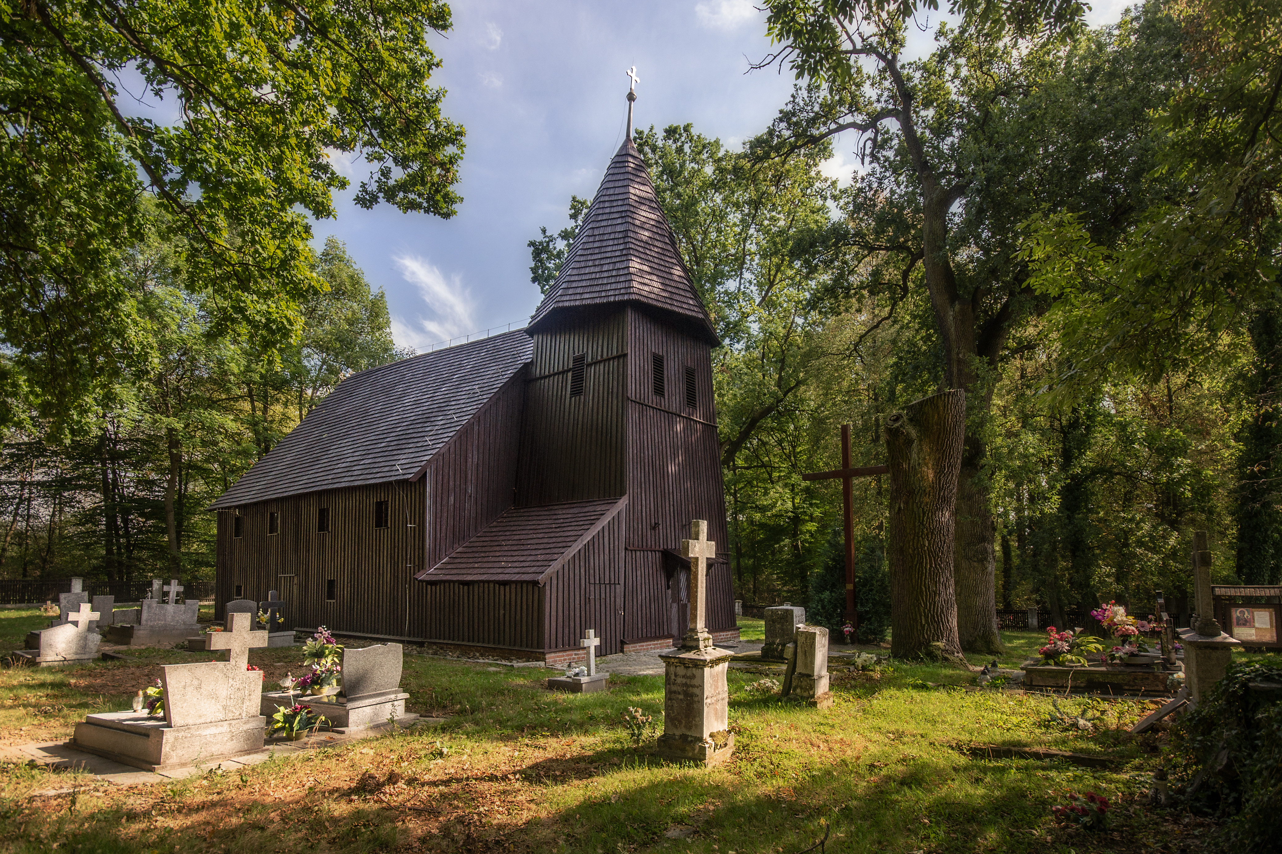 Jakubowice, kościół ewangelicki, ob. rzym.-kat. p.w. Matki Boskiej Królowej Polski, 1585, 1931